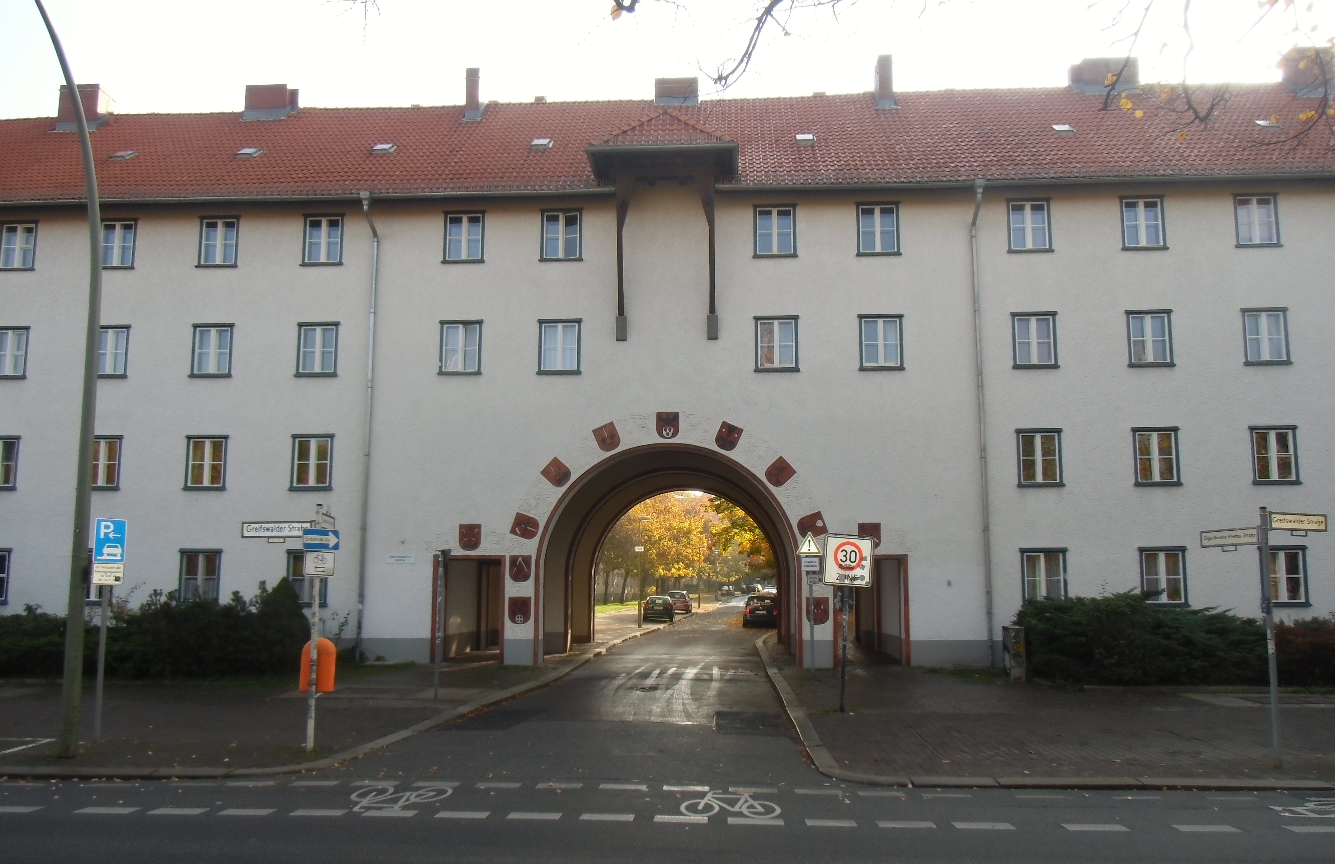 Denkmalgeschützte Wohnanlage in Greifswalder Straße 52-62,, erbaut 1938-1939